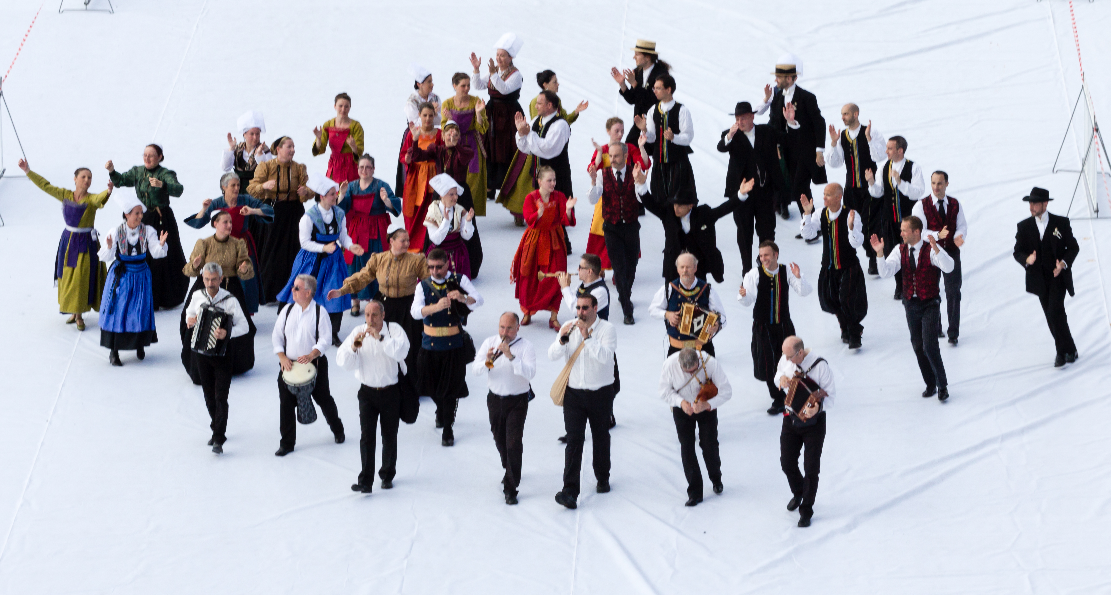 FIL 2012 - Arrivée de la grande parade des nations celtes - Kendalc'h Île-de-France